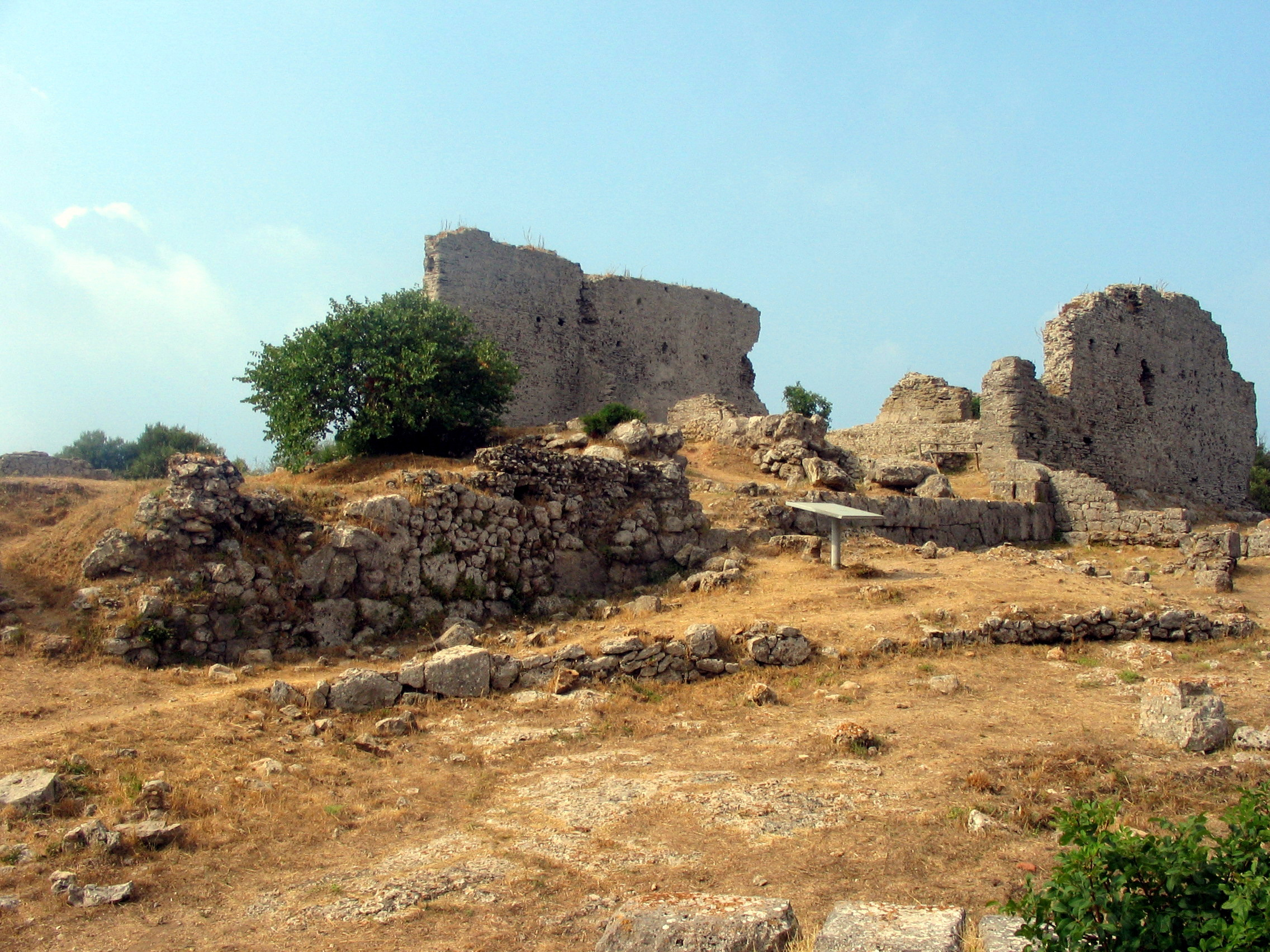 Tempio Capitolino a Cosa, Ansedonia, Orbetello, Toscana, Italia